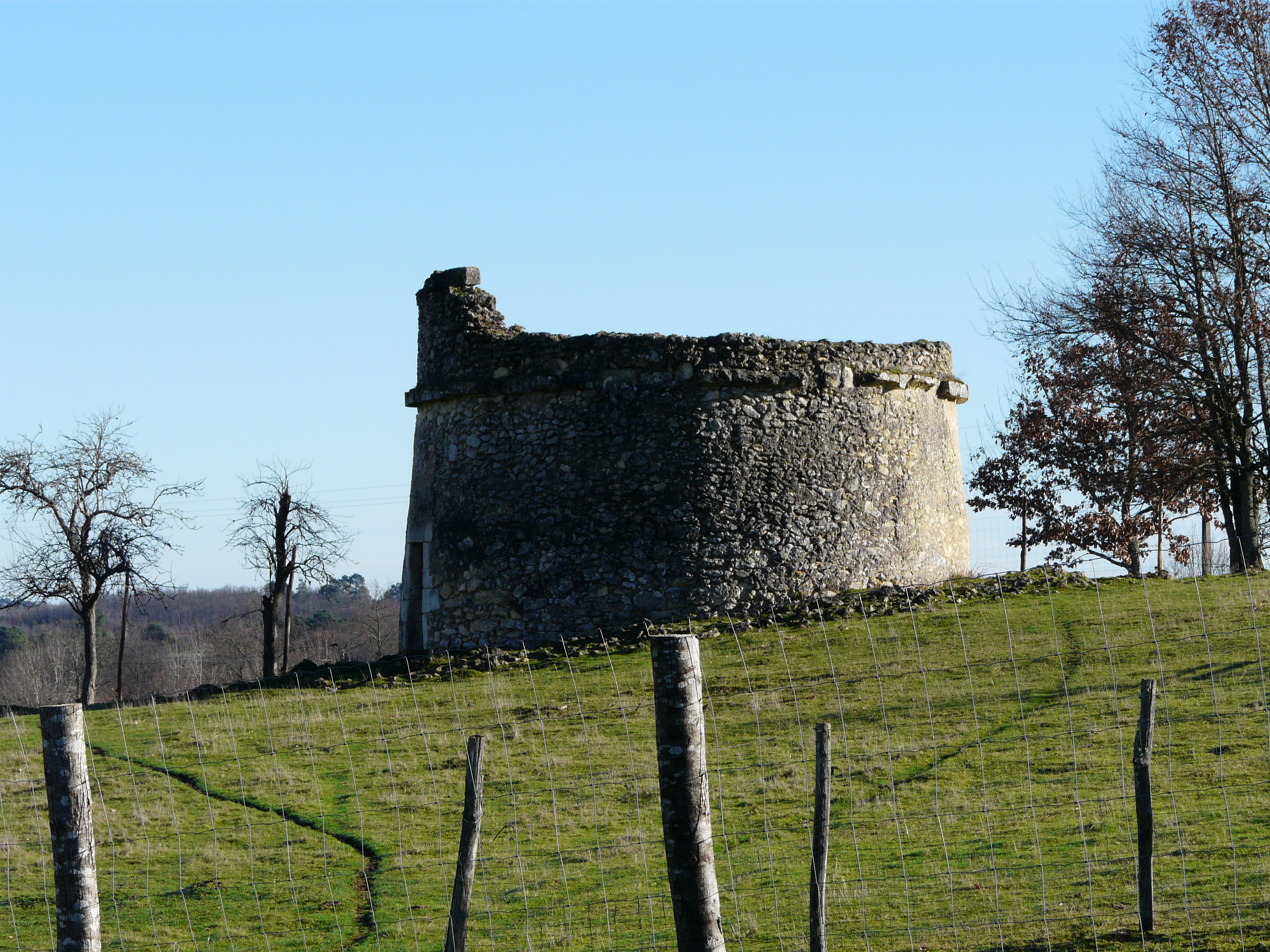 Vestiges d'un pigeonnier au village de Bourrou, Dordogne, France.